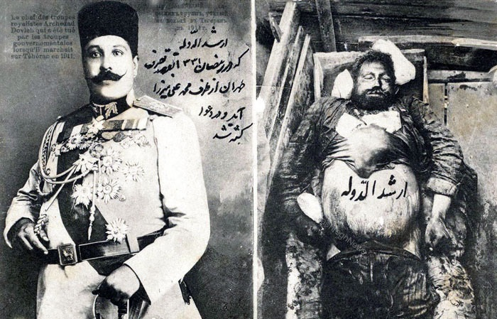 ارشدالدوله قبل و بعد از مرگ